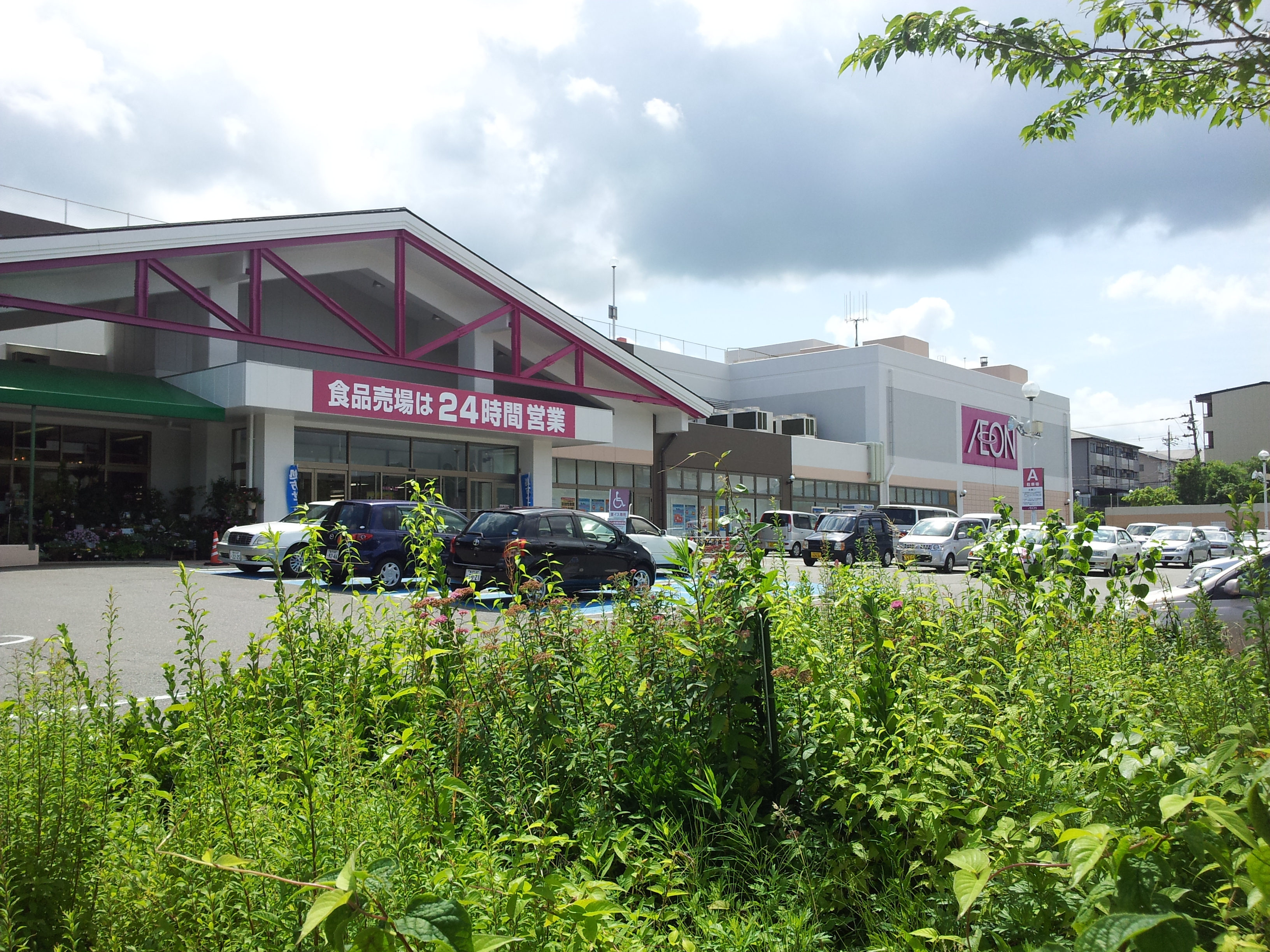 イオン杜の里店正面口